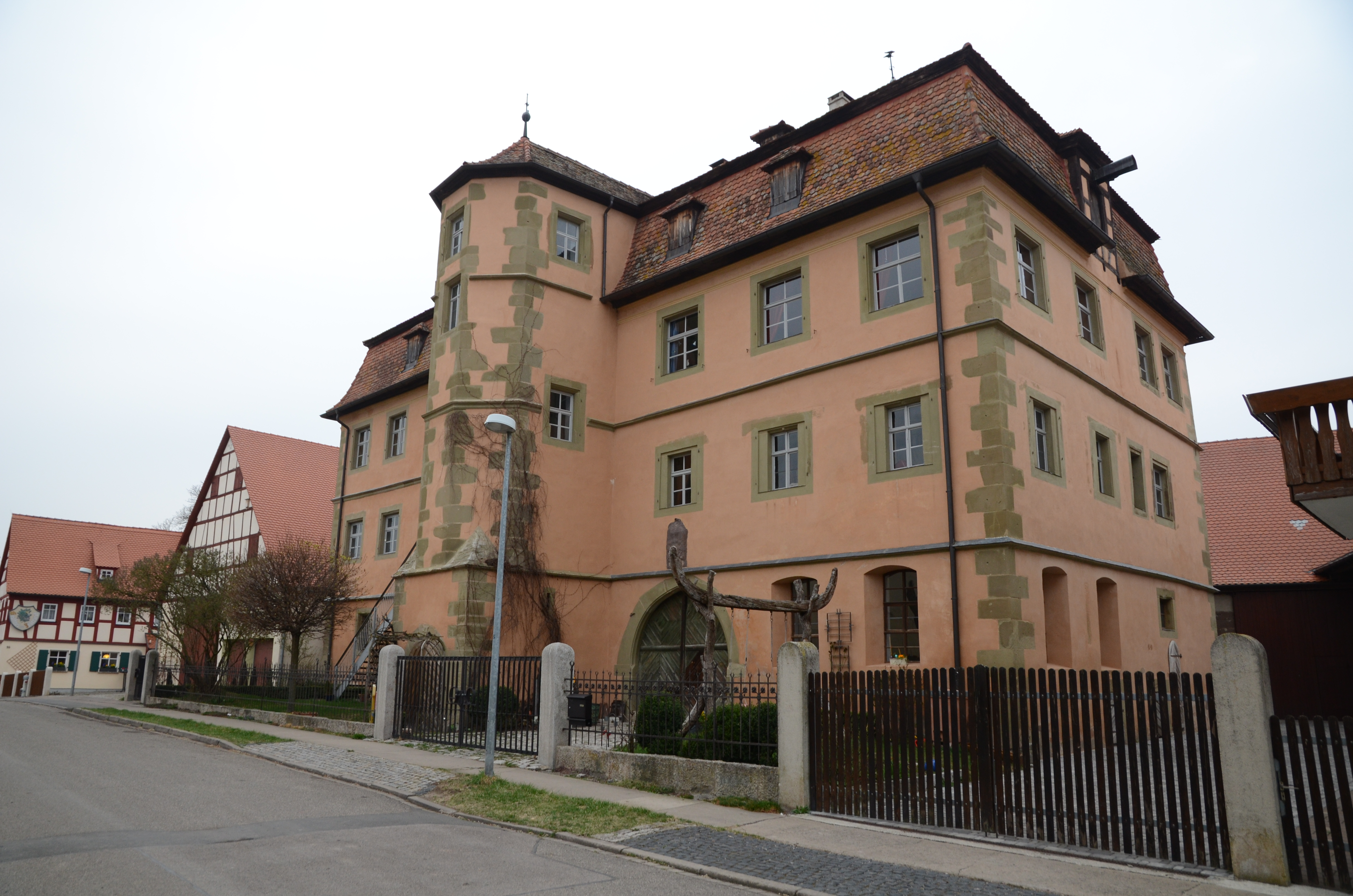 Ickelheim Schlossgasse 12